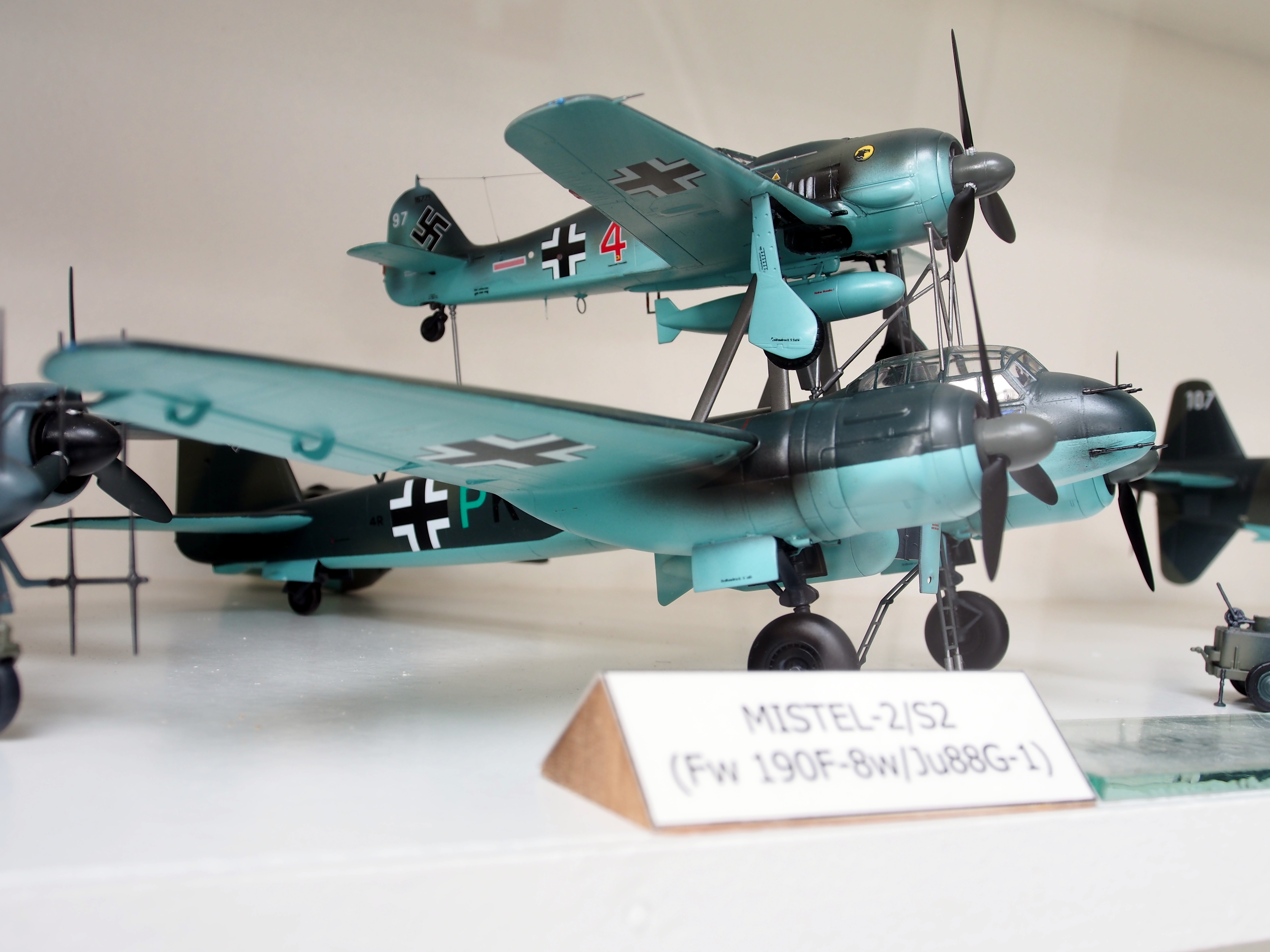 Photographed at the Luftfahrtmuseum Villingen-Schwenningen.